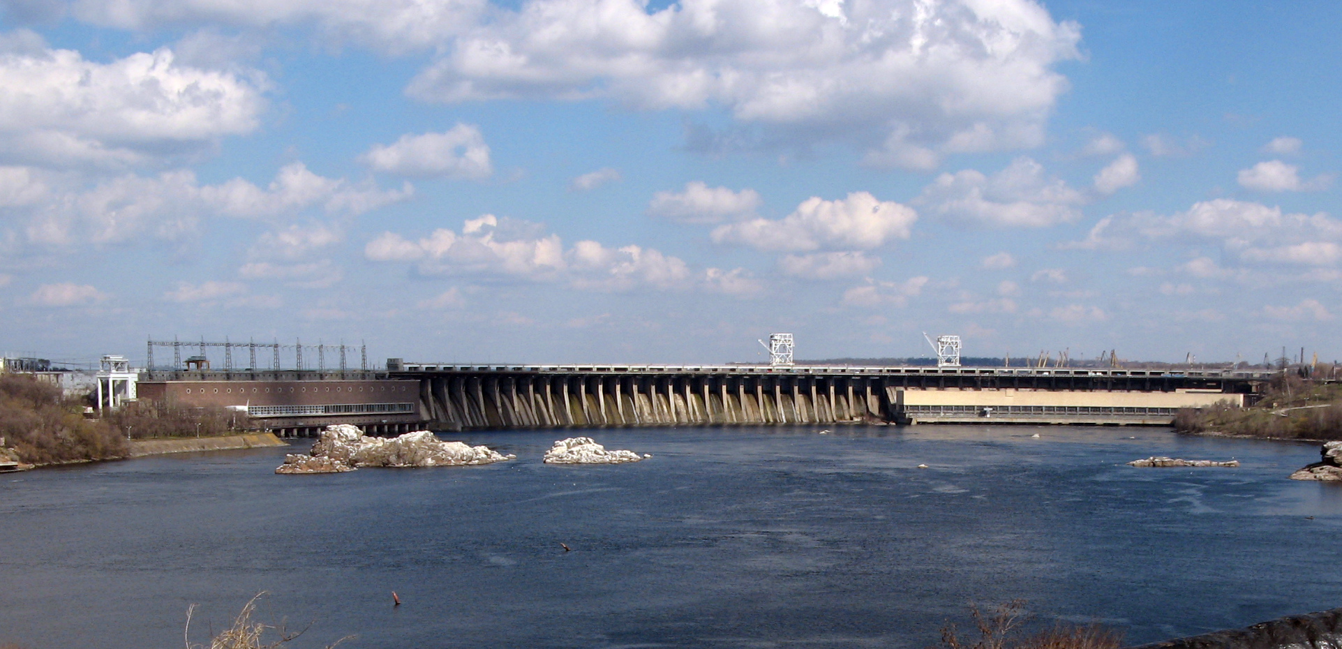 м.Запоріжжя. Дніпрогес (гребля і силова станція) (Панорама №1)